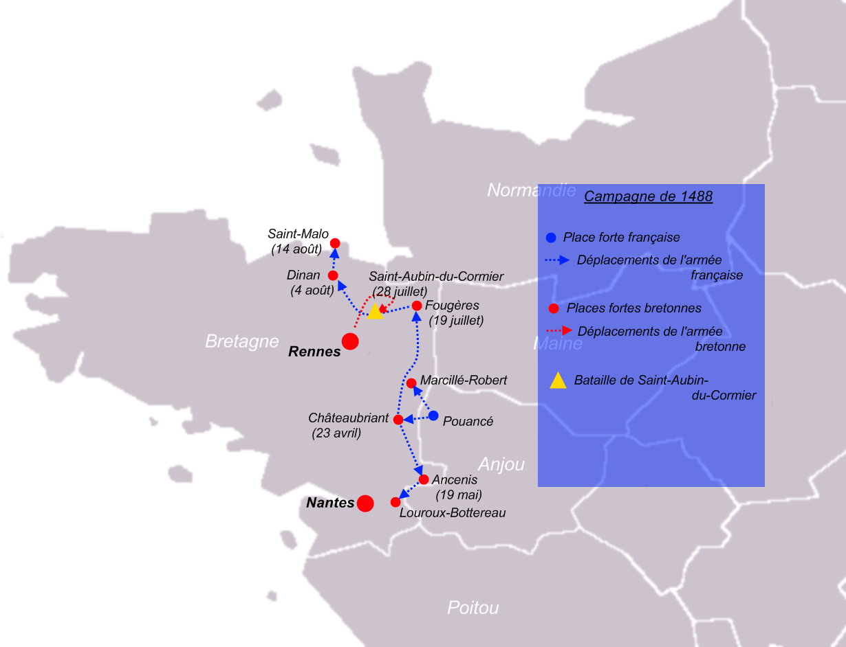 Carte de la campagne militaire de 1488 pendant le conflit franco-breton